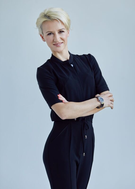 Татьяна Волосожар